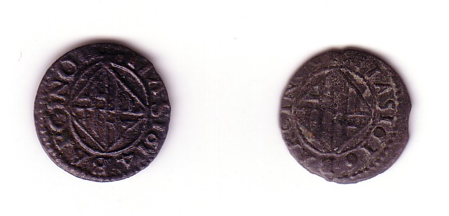 Un ardit era un moneda catalana de billó encunyada a diferents localitats catalanes durant els segles XVI i XVII. A l'anvers dels ardits hi figuren les lletres A-R.